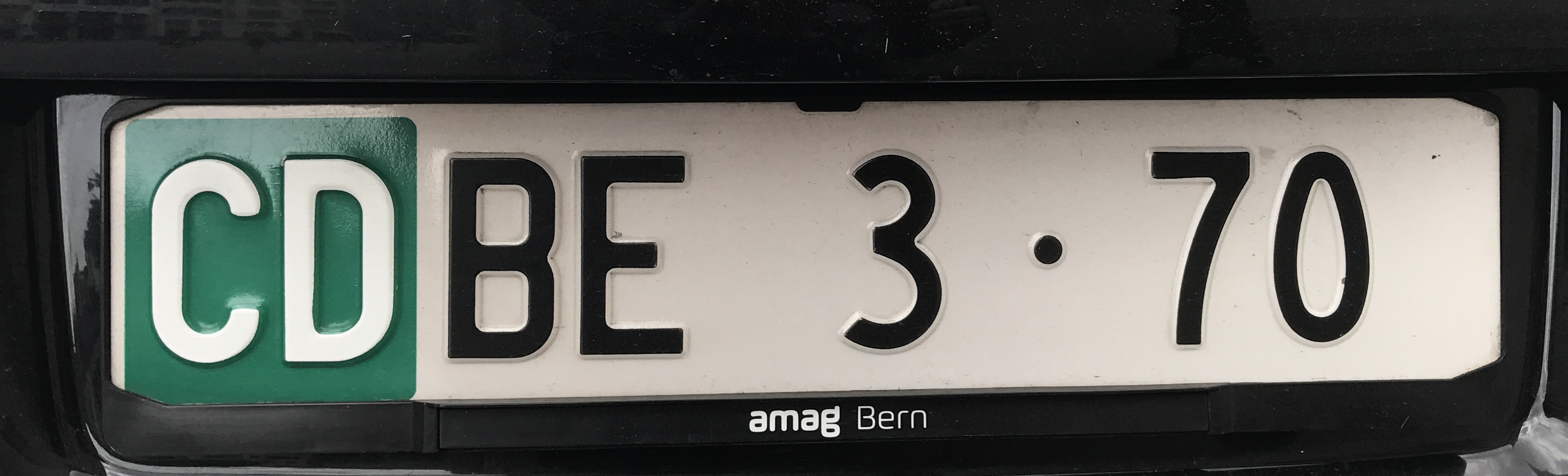 Kontrollschild Kanton Bern, Dienstwagen der diplomatischen Missionen